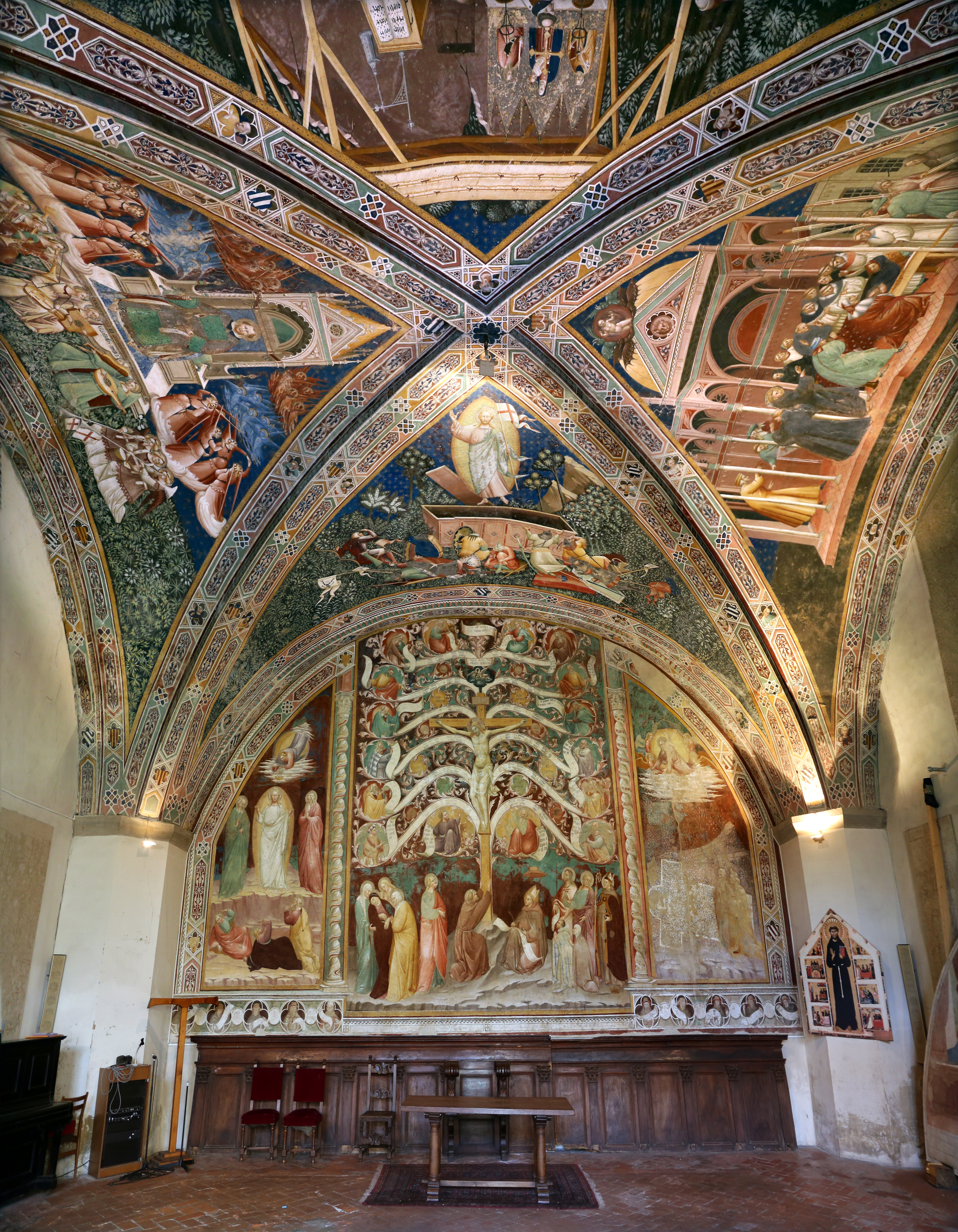 chiesa di San Francesco This is a photo of a monument which is part of cultural heritage of Italy.